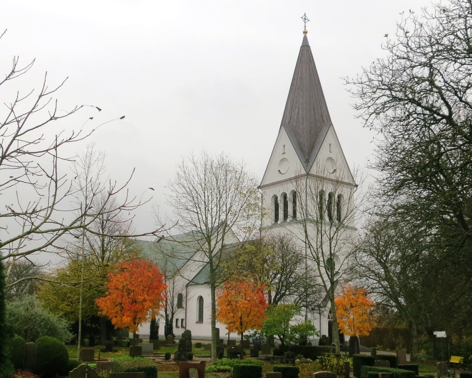 Harplinge kyrka i södra Halland